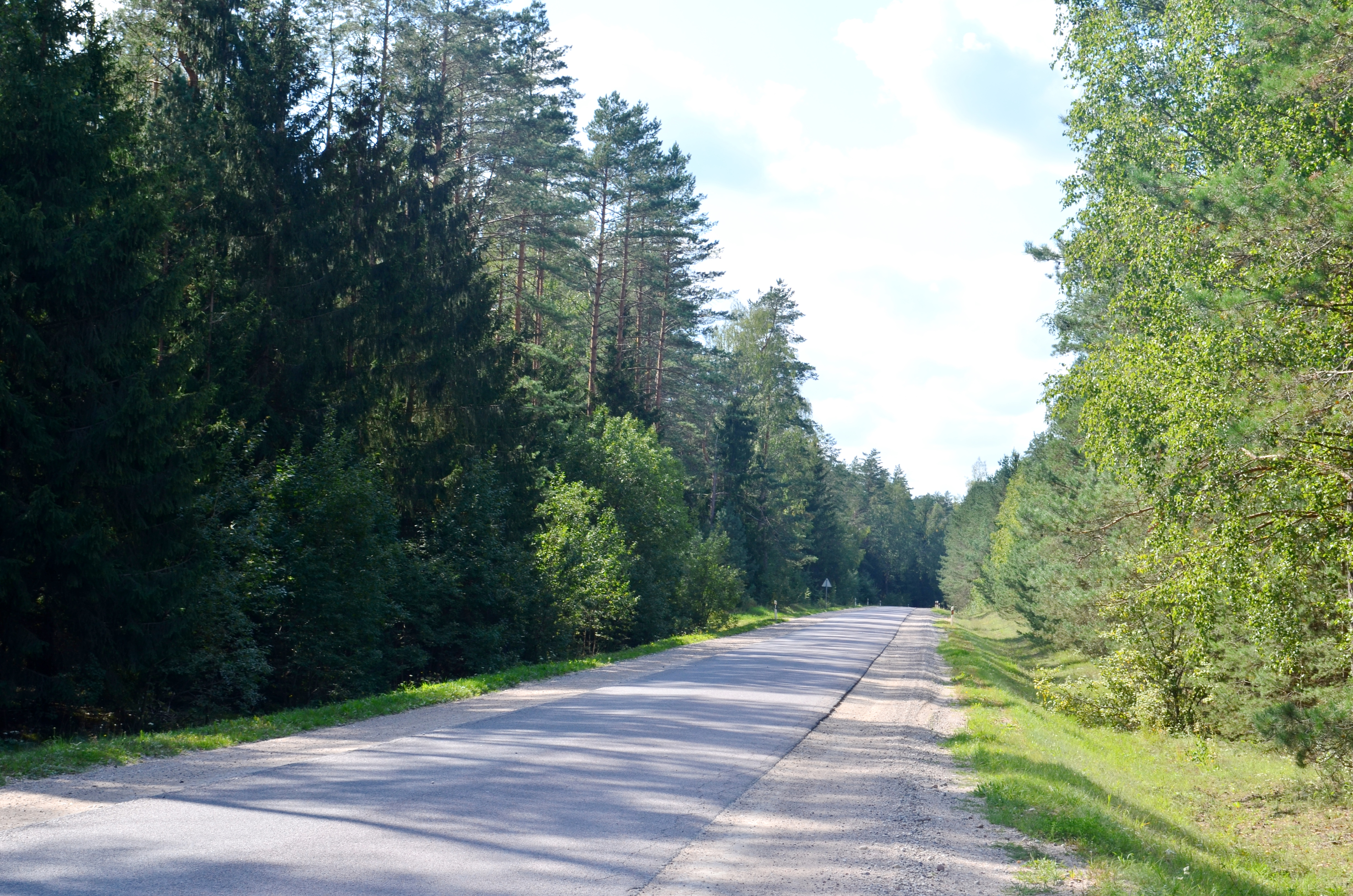 Kelias 176 Rūdninkų girioje, Šalčininkų raj.